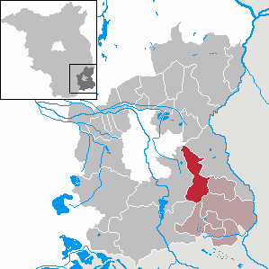 Wiesengrund in Brandenburg (Country) - District Spree-Neiße